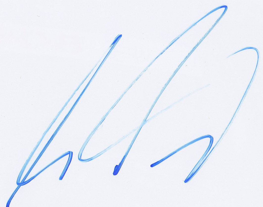 Autogramm von Martin Tomczyk